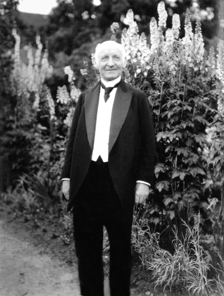 Carl Paul (1857-1927) war deutscher Pfarrer in Rothschönberg und Lorenzkirch, Missionsdirektor des Leipziger Missionswerkes und Honorarprofessor für neuere Missionsgeschichte und Missionskunde der Universität Leipzig. Das Bild zeigt ihn 1924 im Pfarrgarten in Schweta bei Mügeln.